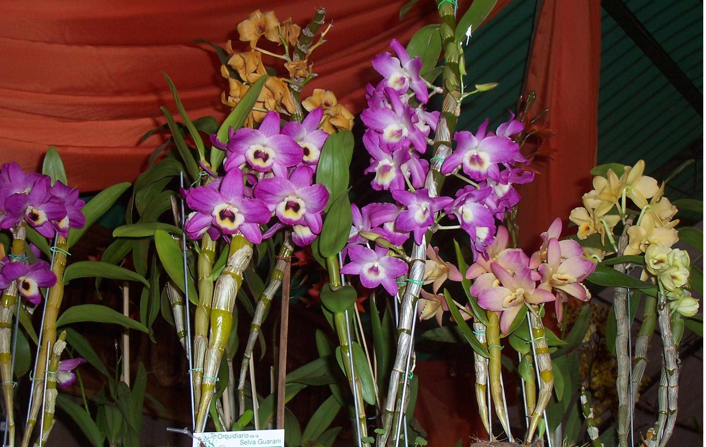 Orquedeas en la Fiesta Nac. del Inmigrante, Oberá (Argentina).